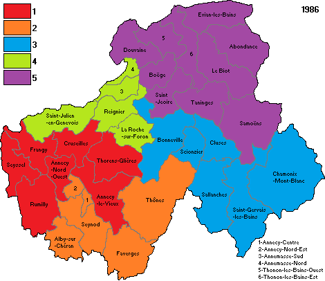 Circonscriptions de la Haute-Savoie en 1986